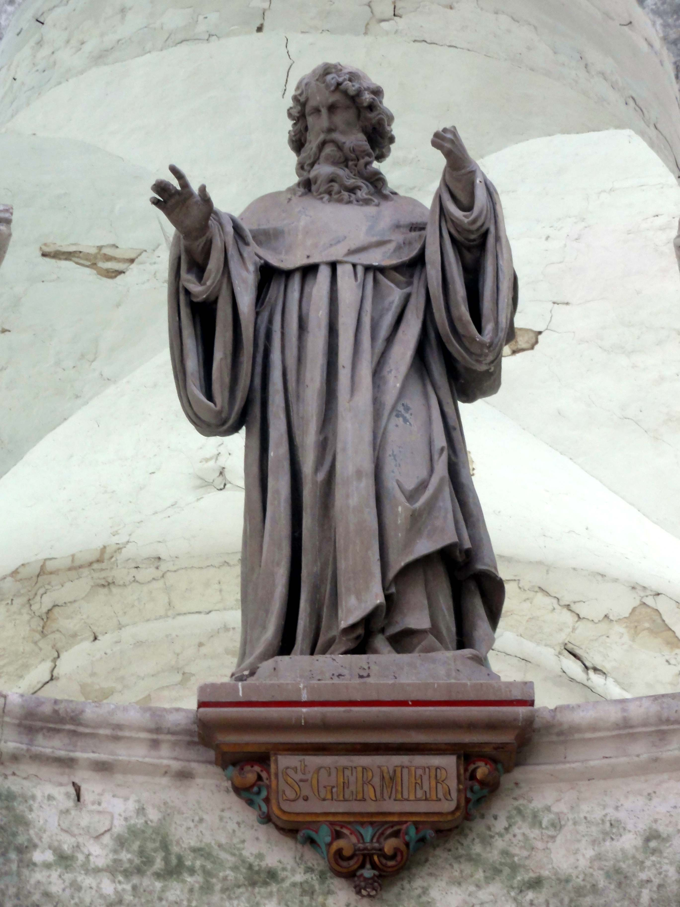 Mobilier de l'église - voir le titre du fichier.